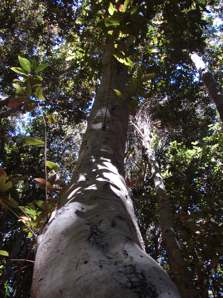 Aextoxicon punctatum en la subida al Cerro Santa Inés, límite entre la IV y V Región